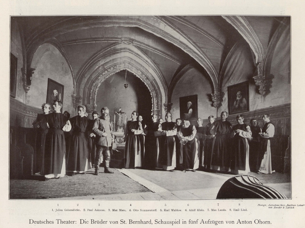 Szenenbild aus dem Schauspiel "Die Brüder von St. Bernhard" von Anton Joseph Ohorn (1846-1924), aus einer Aufführung des Deutschen Theaters in Berlin, 1905.